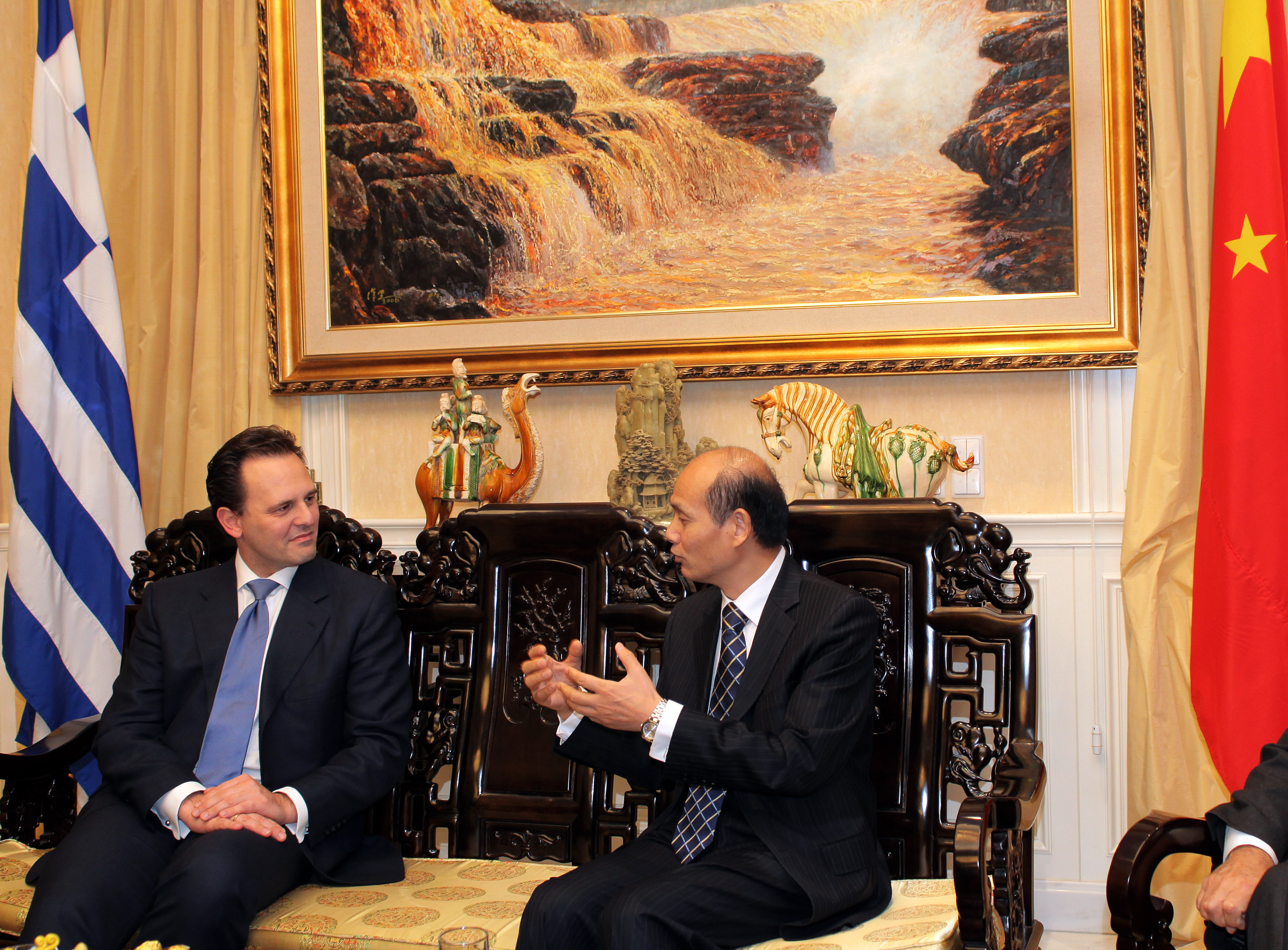 Την Παρασκεύη, 21.01.2011 ο Υπουργος Εξωτερικών κ.Δ. Δρούτσας παρακάθησε σε δείπνο που παρέθεσε ο Πρέσβης της Κίνας στην Ελλάδα, κ. Linquan Luo στην πρεσβευτική κατοικία. On Friday, 21.01.2011 Foreign Minister Dimitris Droutsas attended a dinner hosted by the Chinese Ambassador to Greece Linquan Luo at his residence.